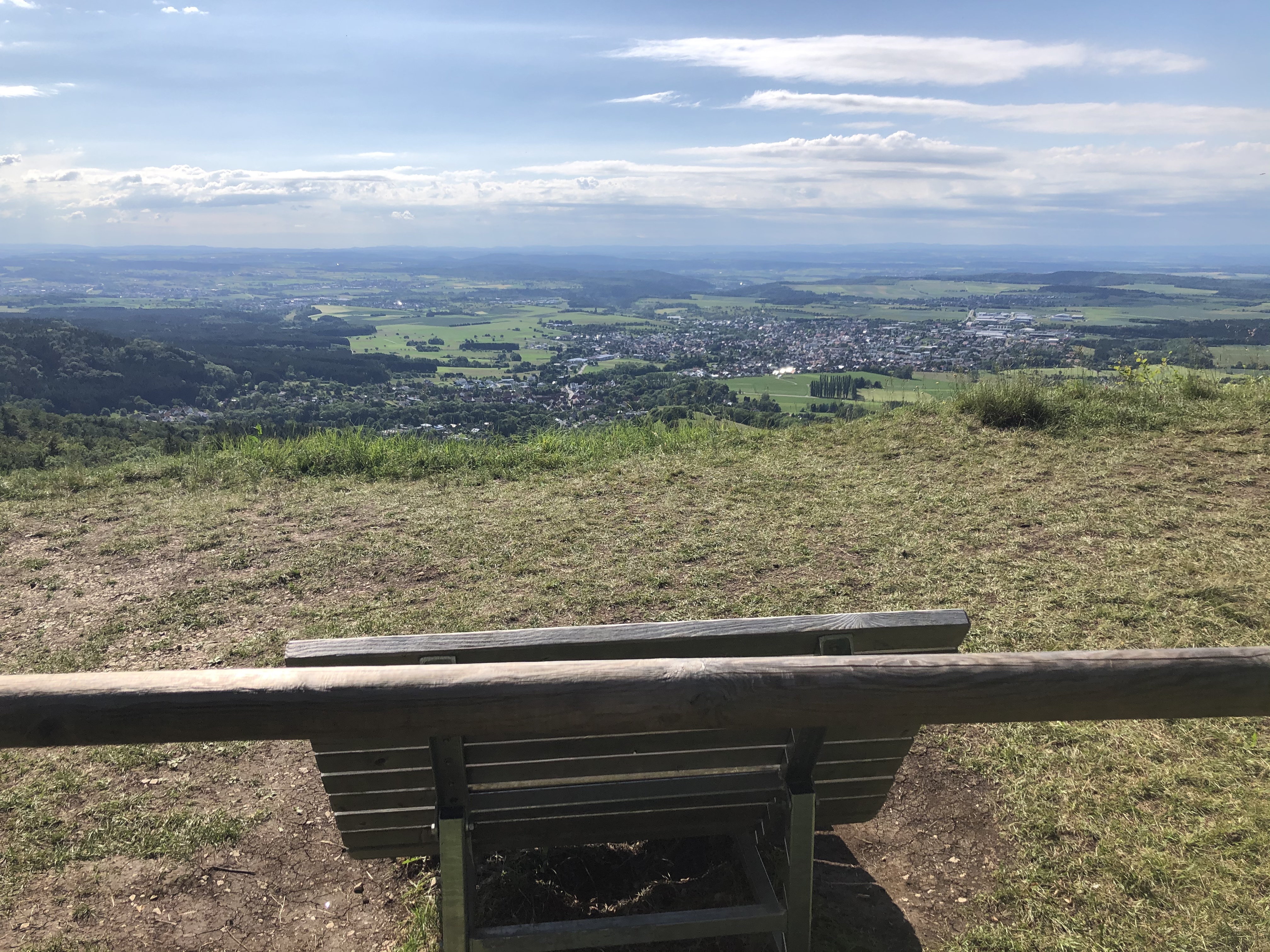 Ruhebank auf dem Blasenberg, Sicht auf Bisingen